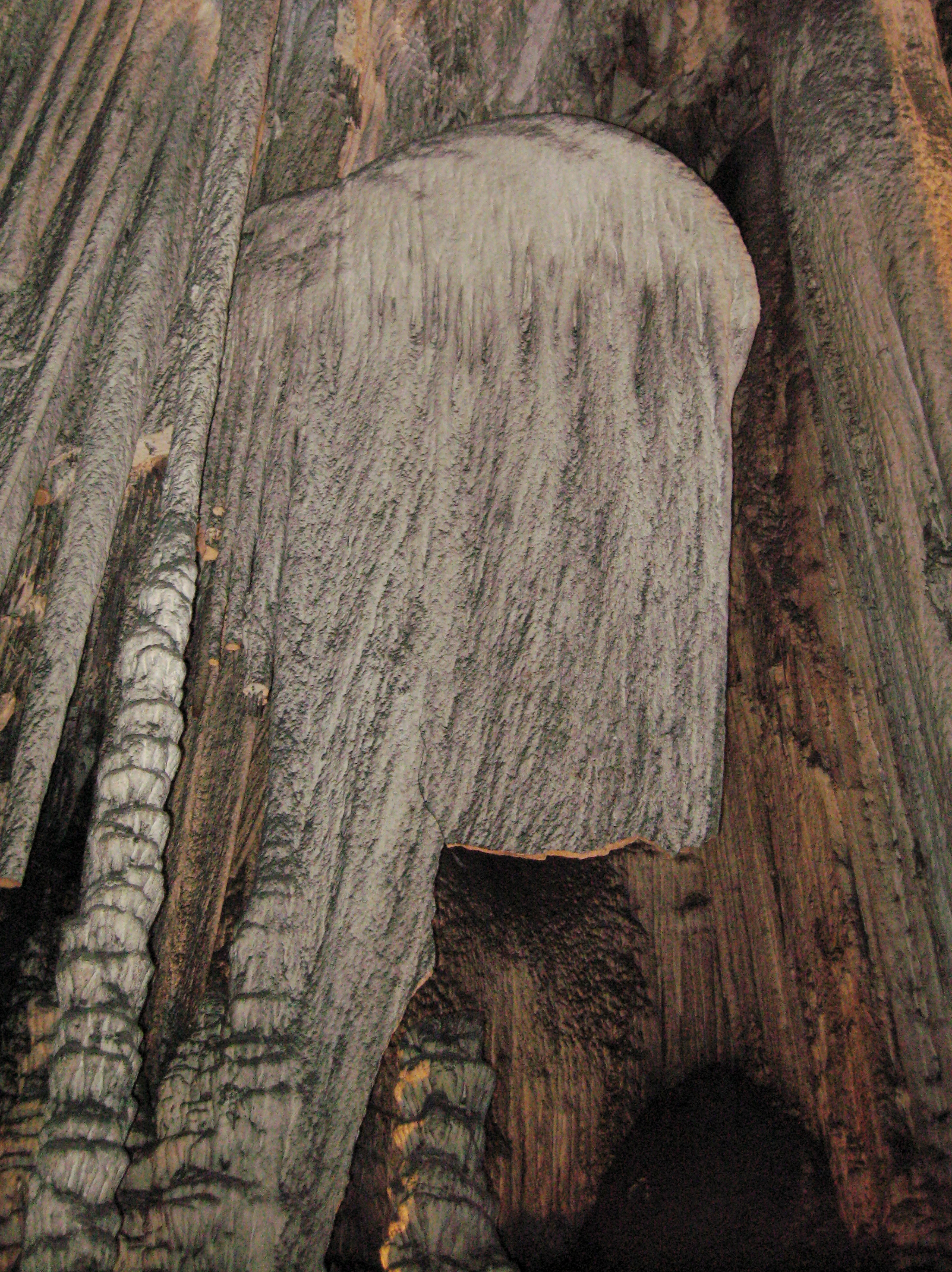 Coves d’Artà, Gemeinde Capdepera, Mallorca, Spanien